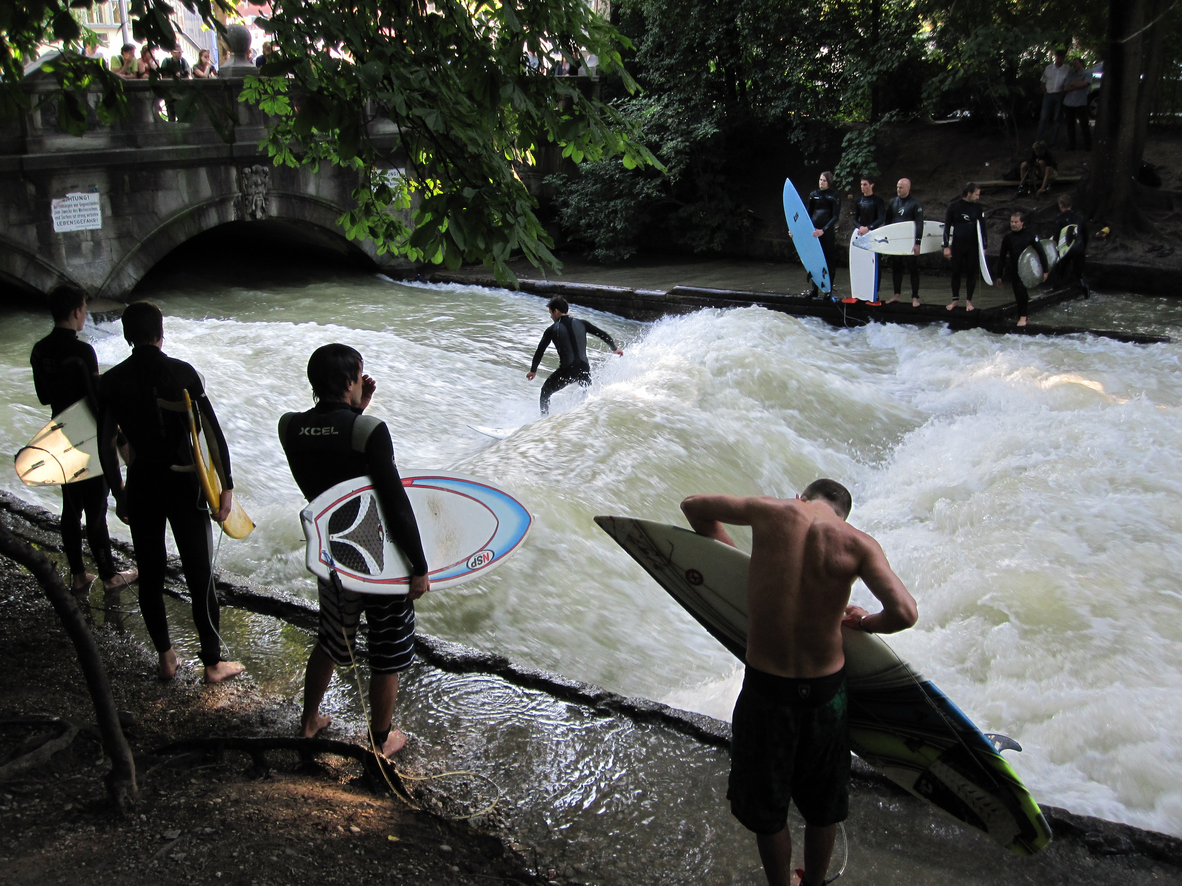 Surfer am Eisbach in München